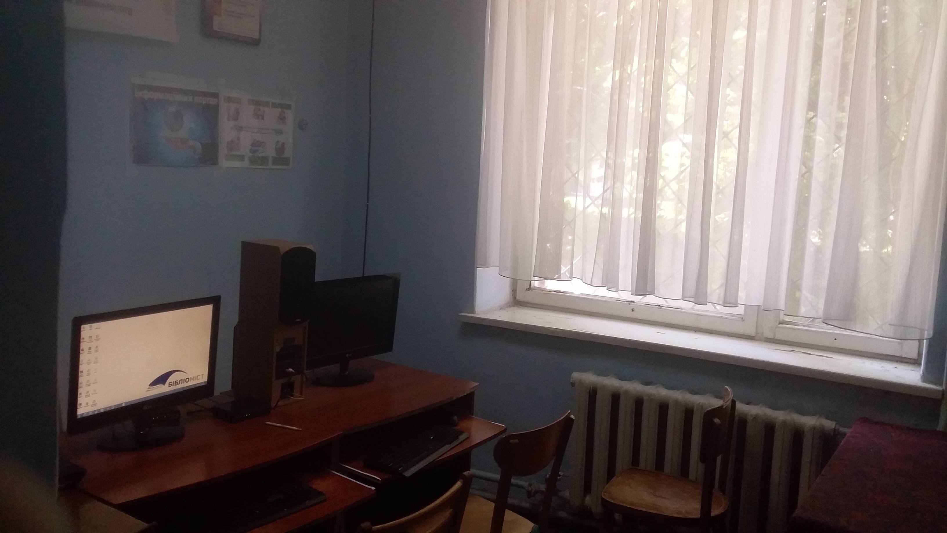 Пункт доступу до мережі Інтернет бібліотеки-філії №9 Хмельницької міської ЦБС